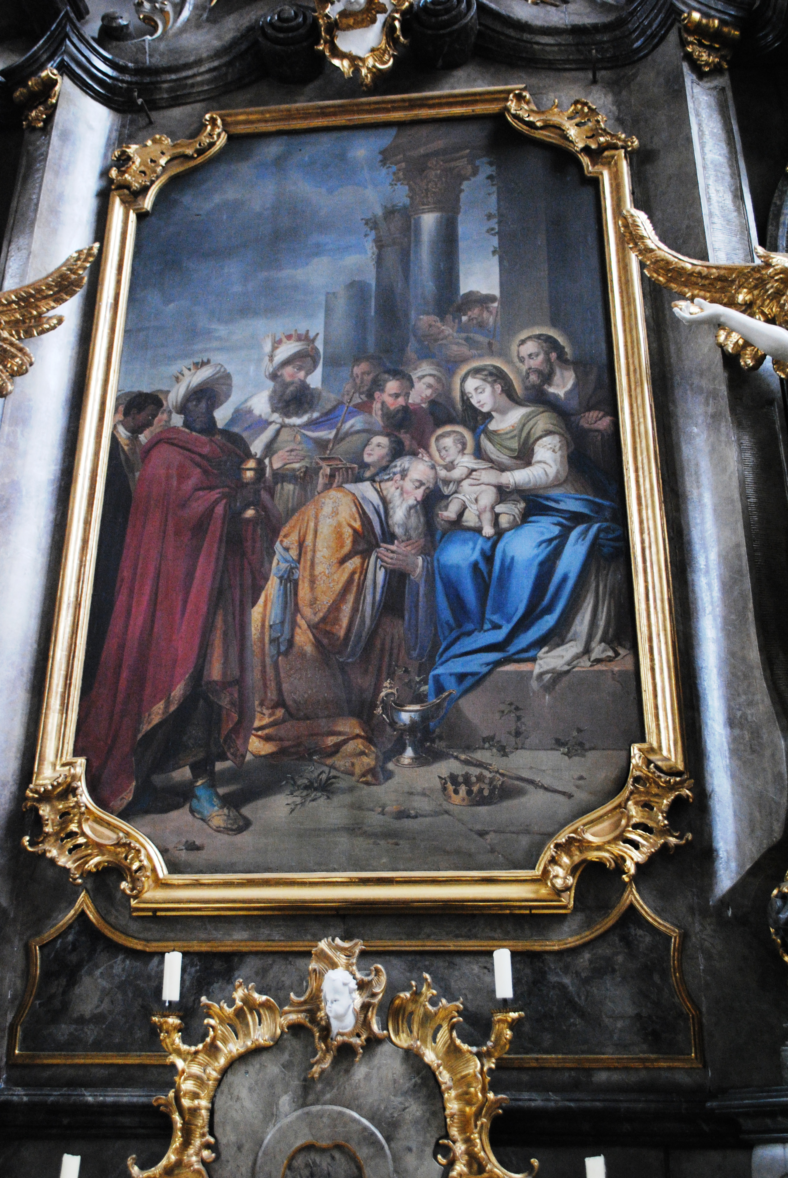 Bild des rechten Seitenaltars, Anbetung der Heiligen Drei Könige, St. Bartholomäus, Volkach, Peter Geist 1853